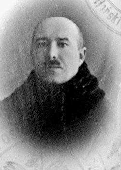 be:Антон Іванавіч Луцкевіч